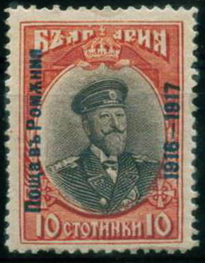 Почтовая марка Болгарии для оккупированной части Румынии